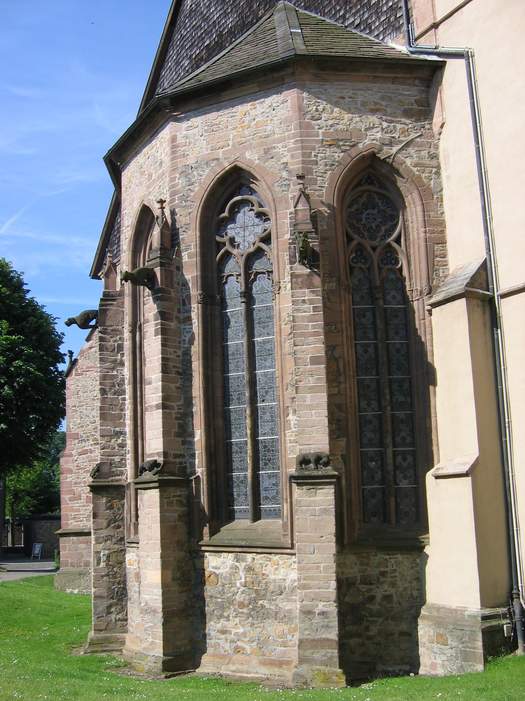 Beschreibung: Außenansicht der Chorapsis (St. Marien zu Lemgo)